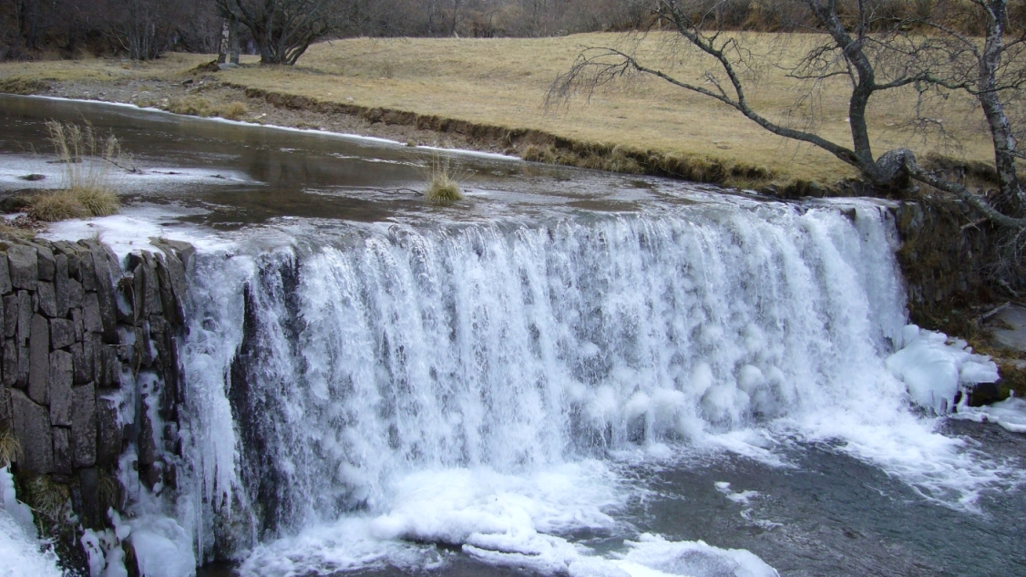 Le Lot au Tournel, Lozère, France